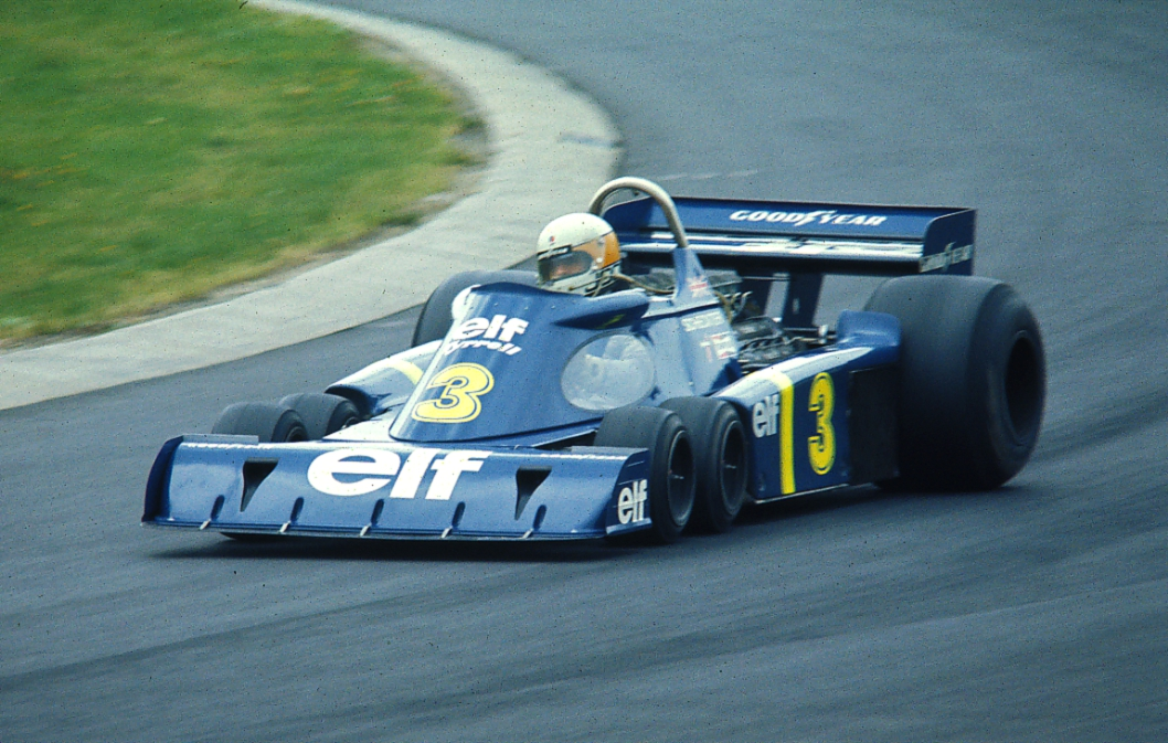 Jody Scheckter 1976 im Tyrrell-Ford P 34 in der Südkehre des Nürburgrings